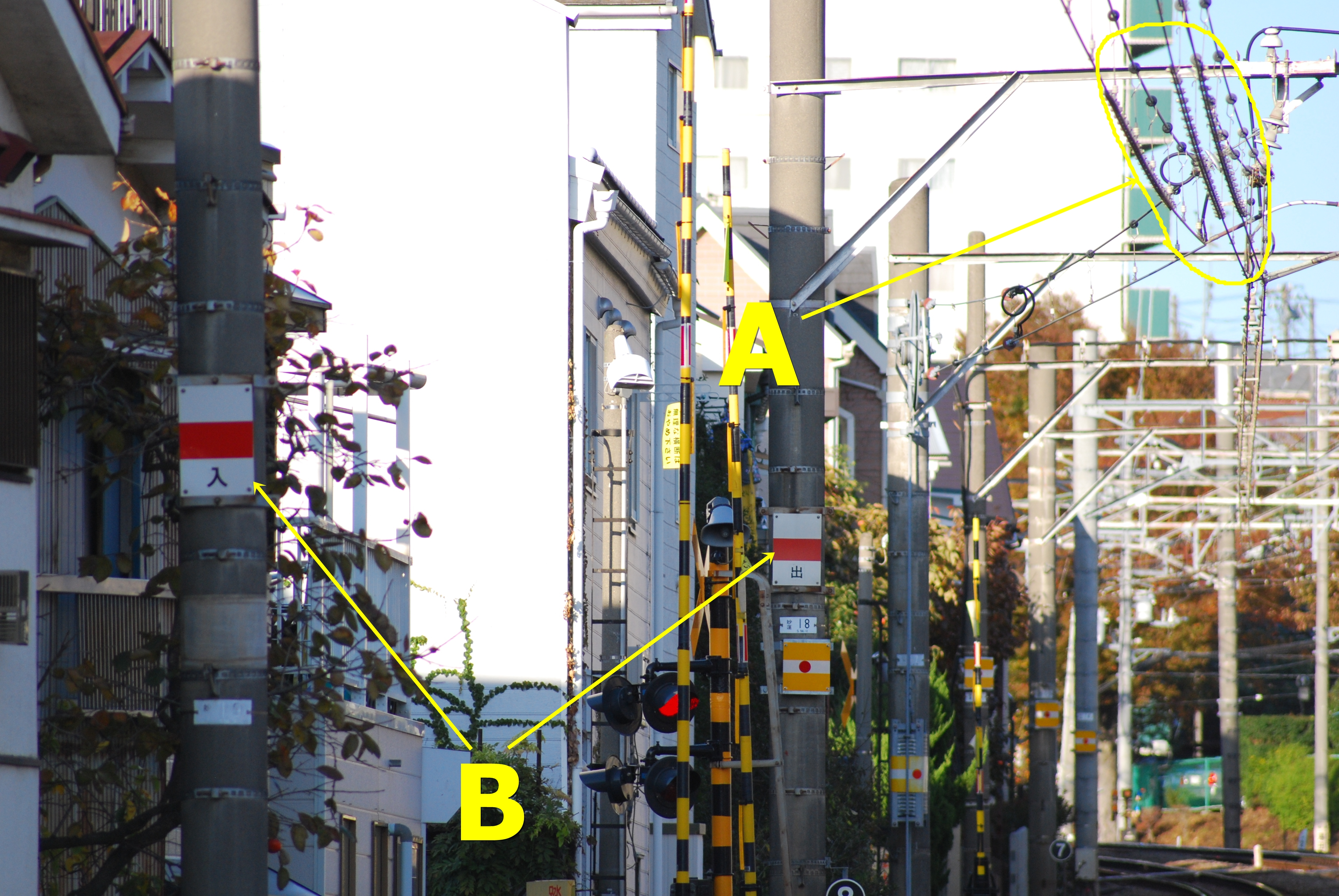 架線のエアーセクション（A）と電車線区分票（B）。（公道から撮影）